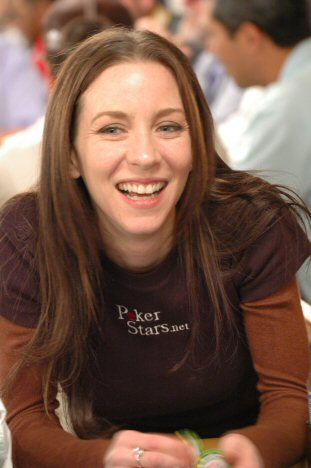 Isabelle Mercier